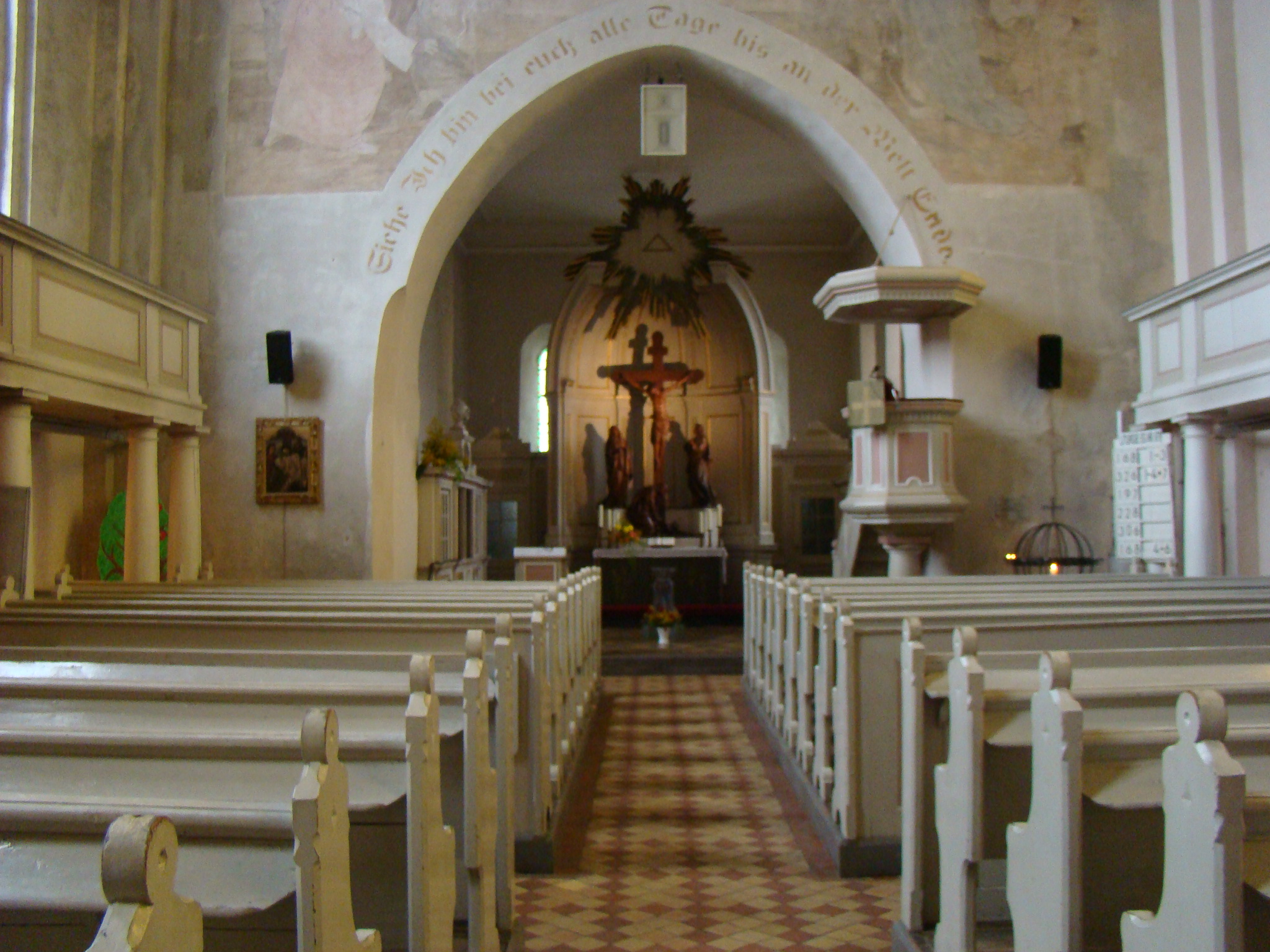 Marienkirche in Waren, Blick zum Altar. Foto: Peter Schmelzle 2011